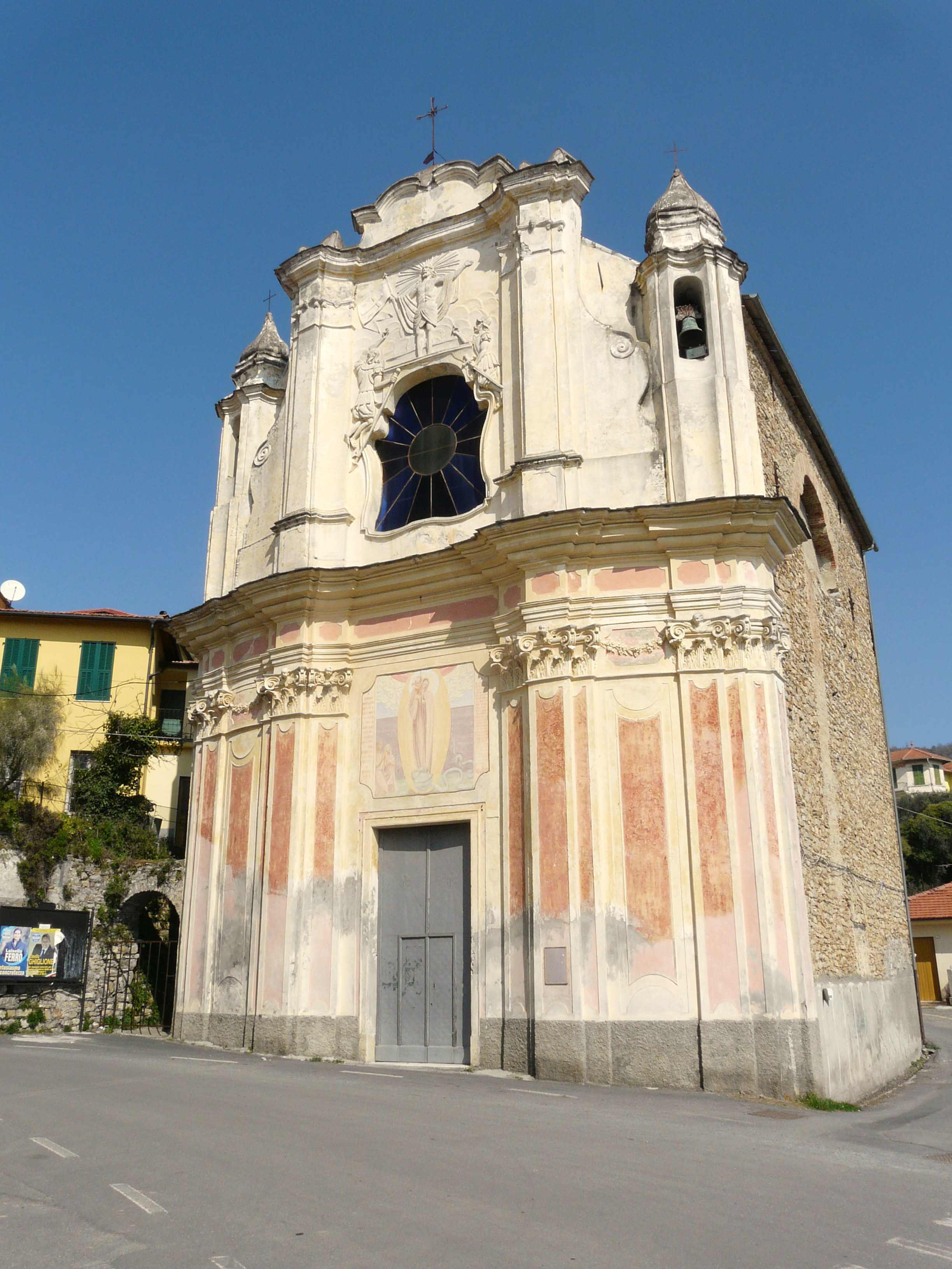 Oratorio dell'Immacolata Concezione, Vasia, Liguria, Italia